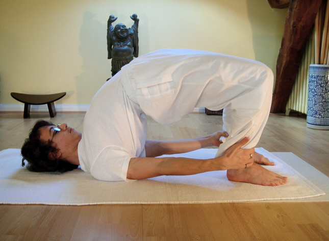 Yoga postures dvipada_pitham